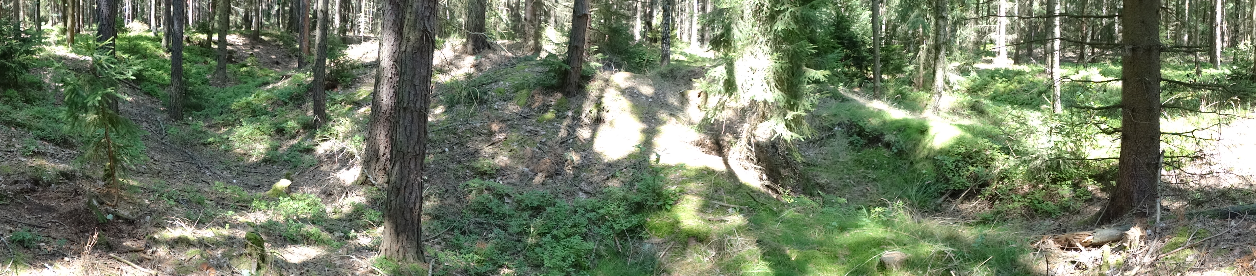 hradisko